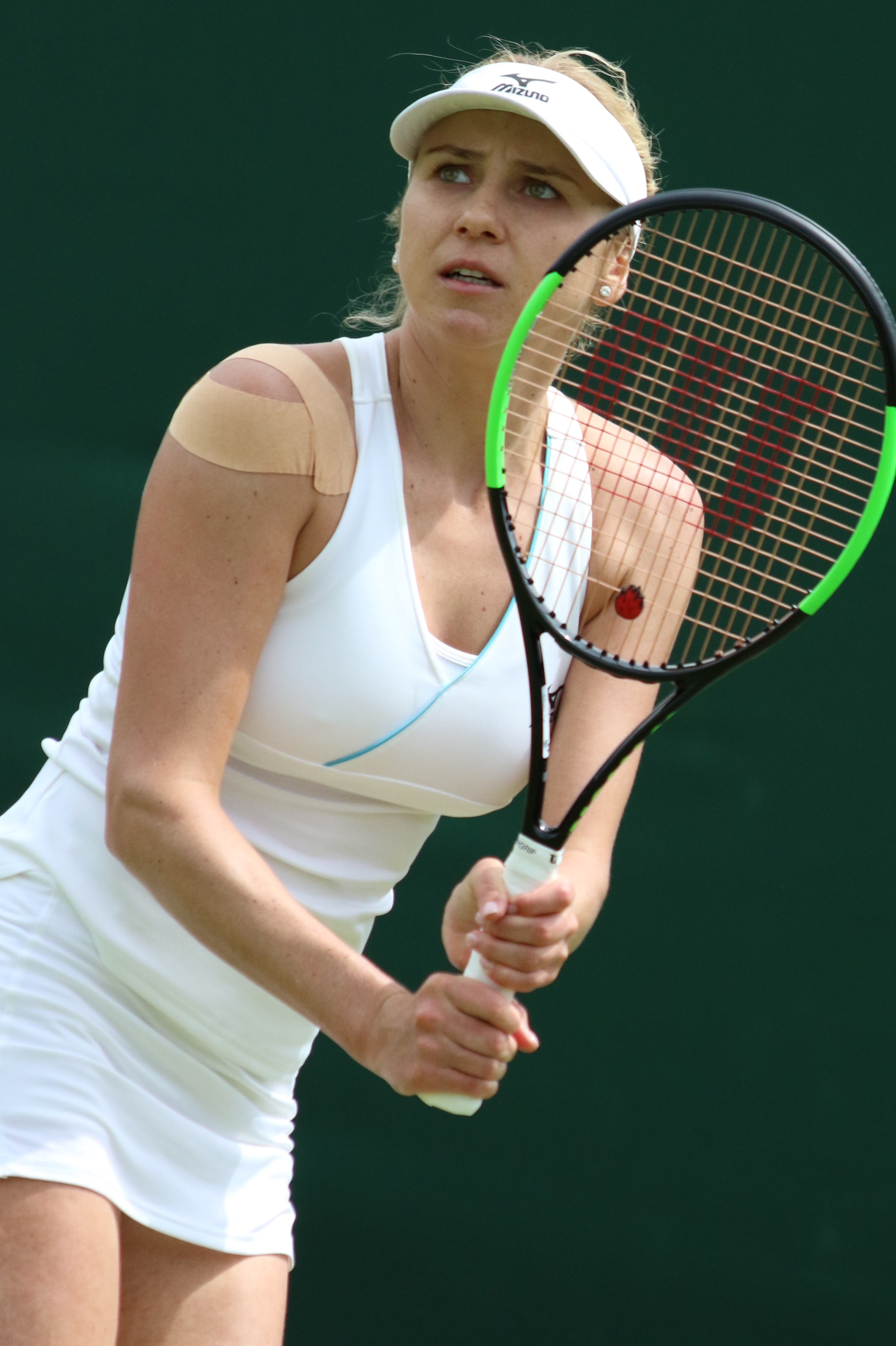 Kichenok L. WM19 (8)